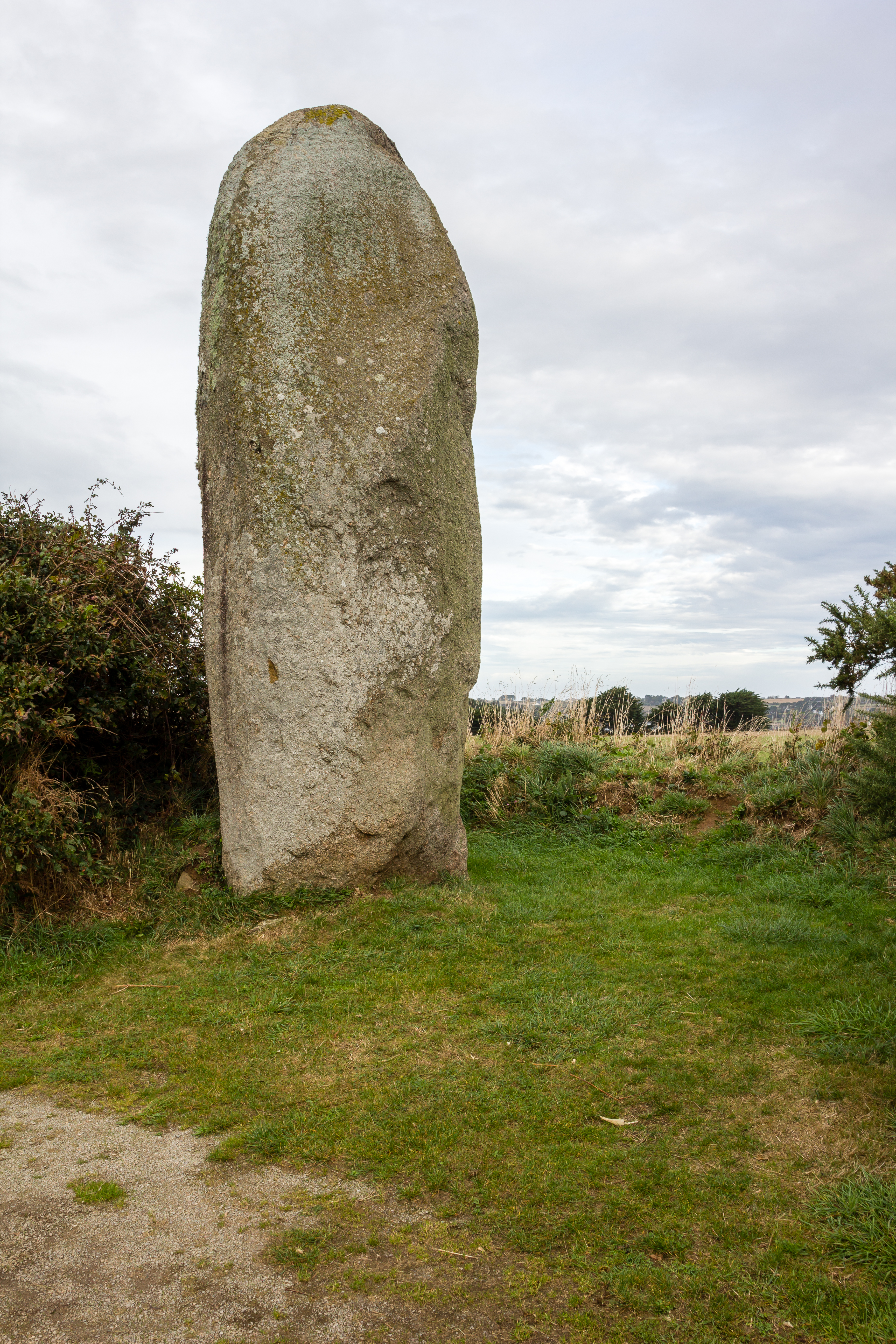 Le menhir de Lann al Louarn à Plouguin (France) en octobre 2013 (face ouest).